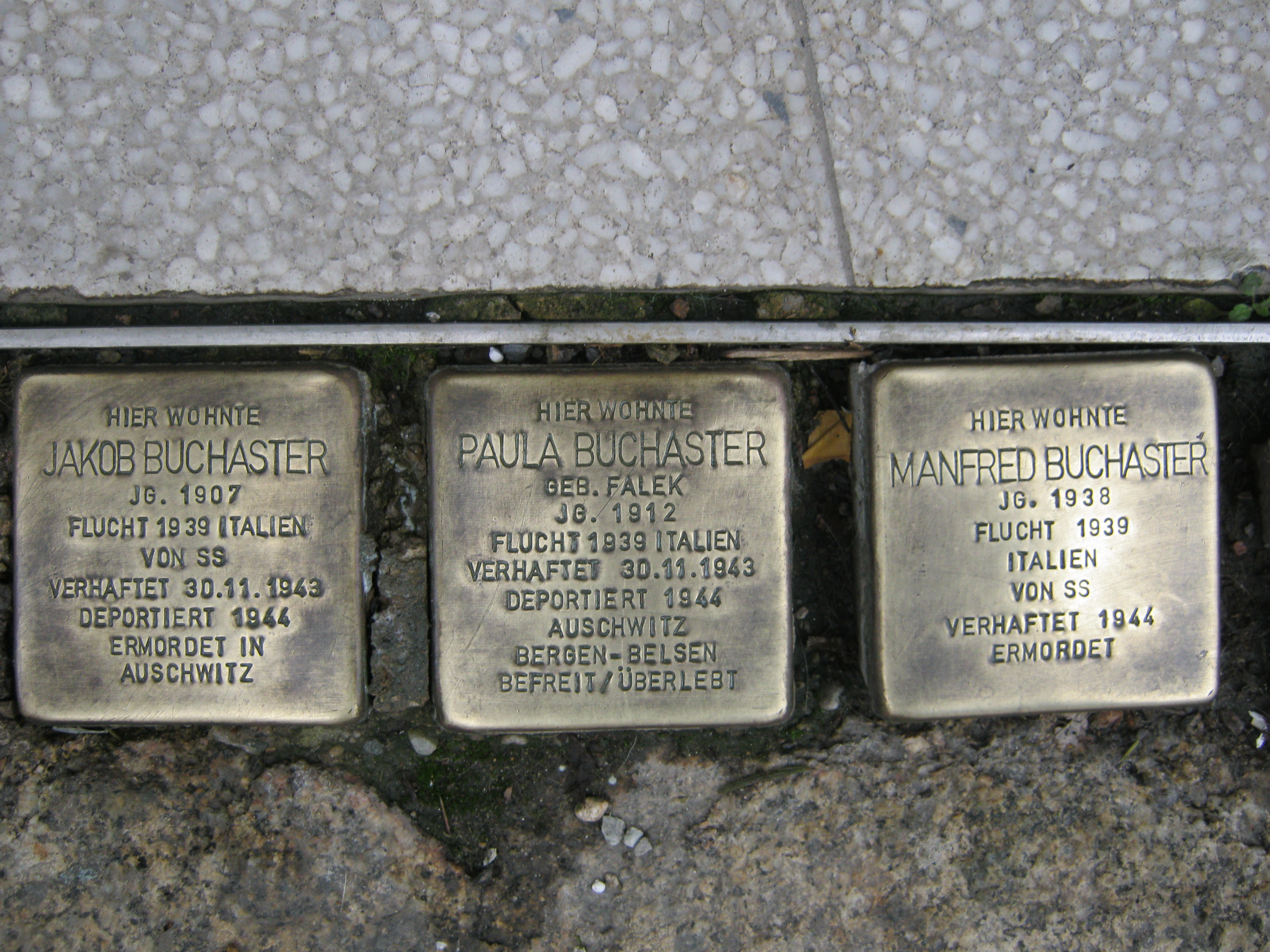 Stolperstein Buchaster